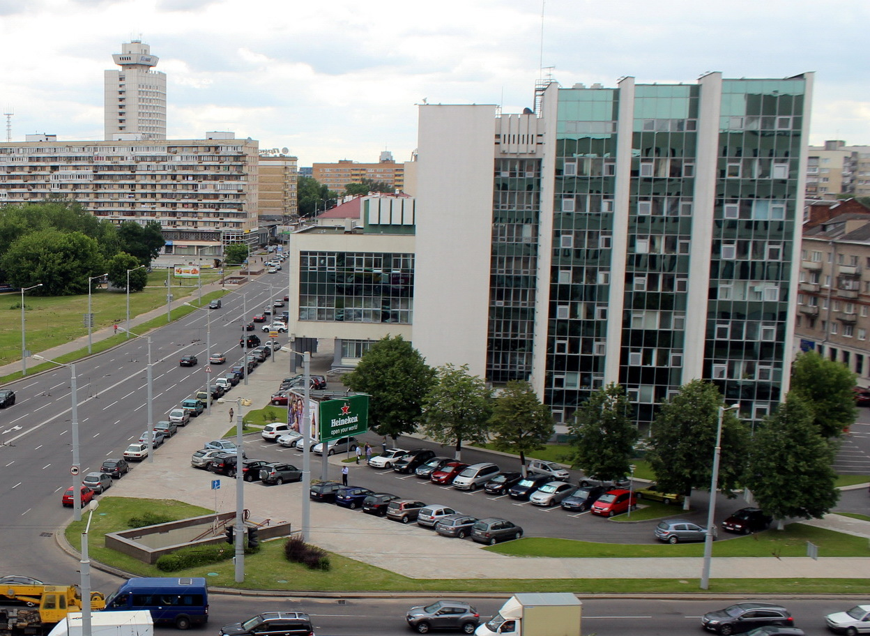 Скрыжаванне вул. Кальварыйскай і Клары Цэткін